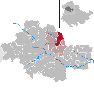 Schlotheim in Thuringia - Unstrut-Hainich-Kreis